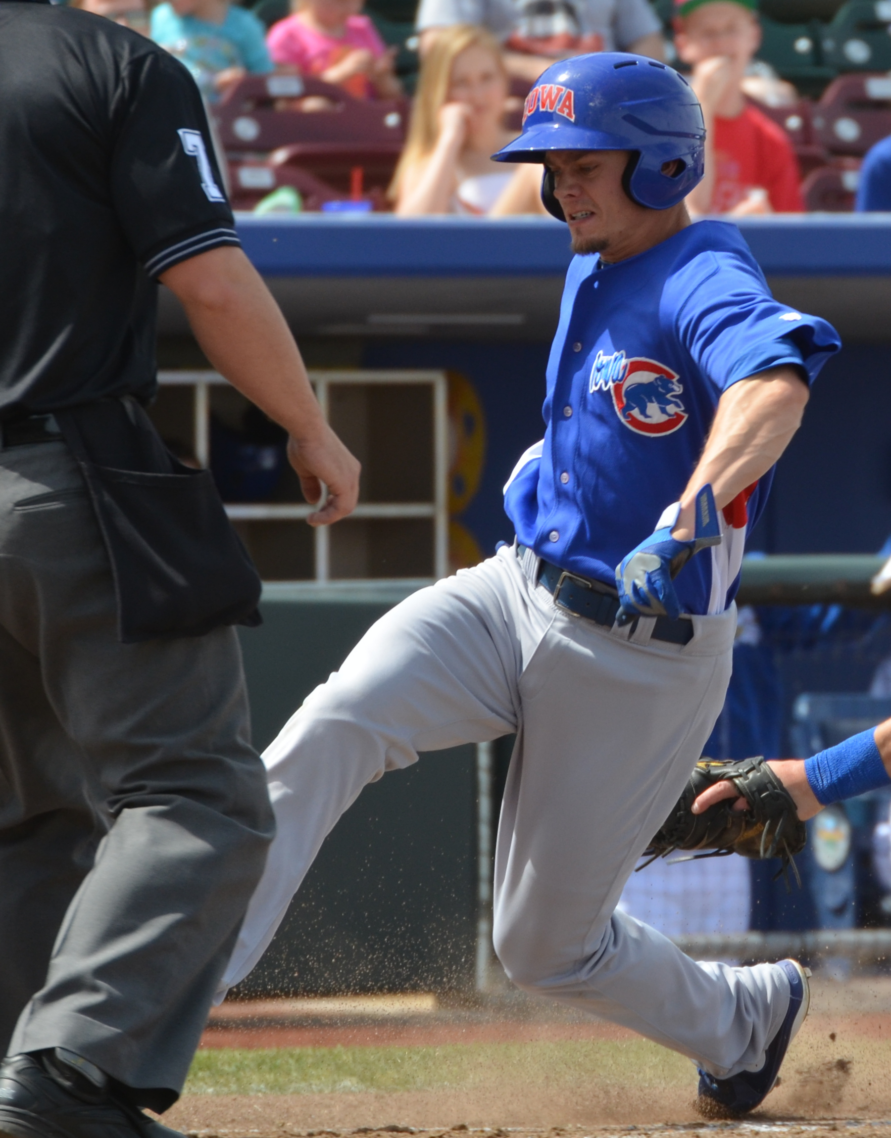 Brent Lillibridge